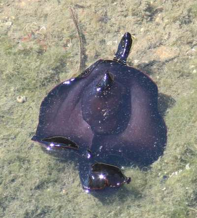 Aplysia punctata Aplysie photographié dans le port de Crouesty (Morbihan - France).